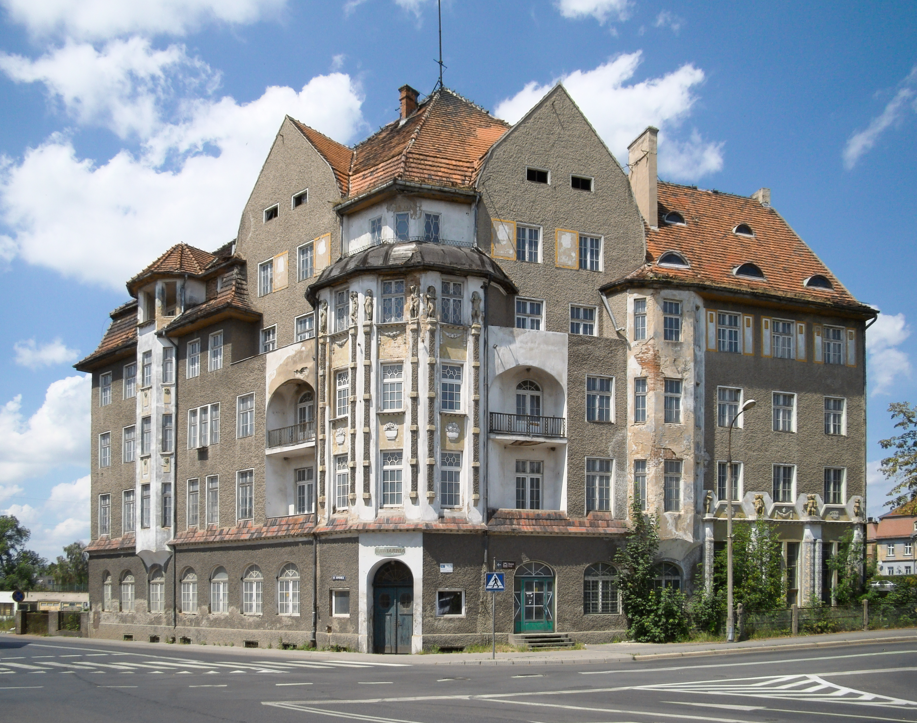 Dzierżoniów, ul. Sienkiewicza 4 - hotel Polonia